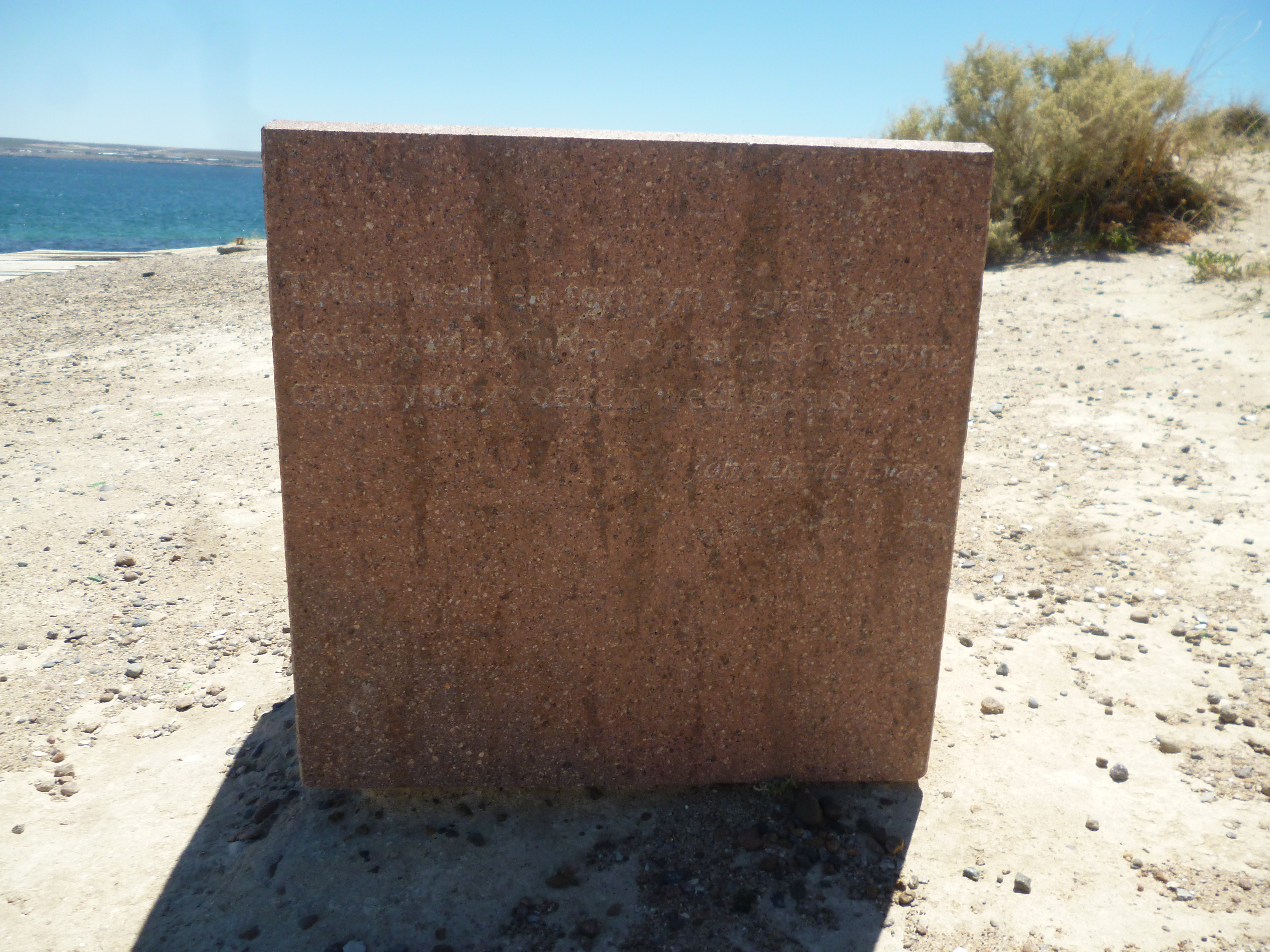 Monumento al desembarco galés, Punta Cuevas, Y Wladfa. La placa contiene los nombres de todos los colonos llegados en el Mimosa